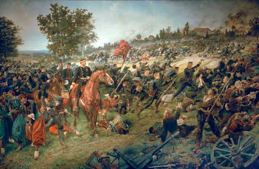 Während der Schlacht bei Wörth am 6. August 1870 griffen Truppen der Württembergischen Felddivision (Generalmajor Hugo von Obernitz) erfolgreich die französischen Stellungen vor Elsasshausen und Frœschwiller an. Der Künstler Georg Bleibtreu (1828–1892) begleitete die Truppen im Auftrag des württembergischen Königs und hielt die Ereignisse fest. Öl auf Leinwand, 158 x 236 cm.